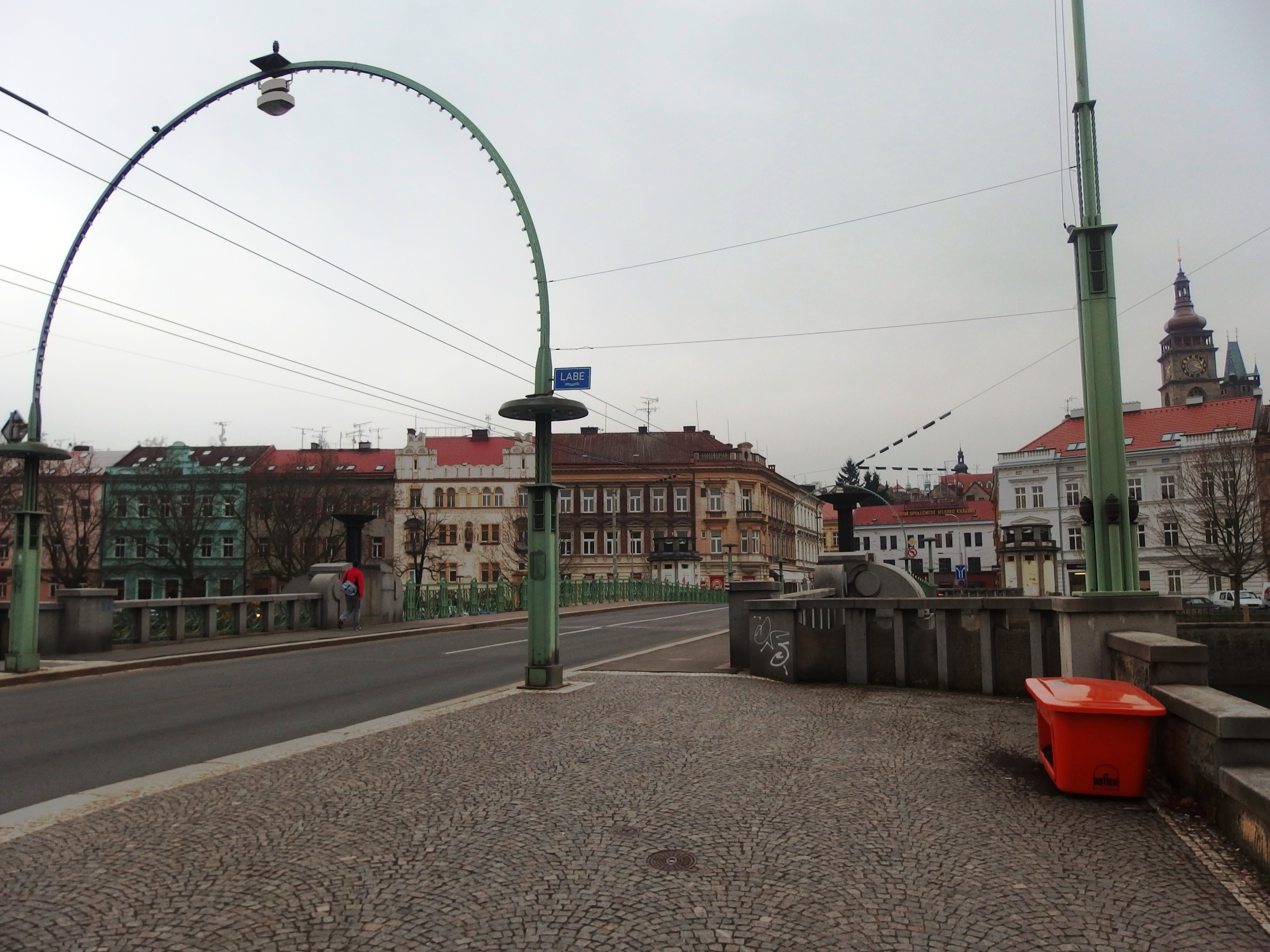 Silniční most - Pražský s kiosky (Hradec Králové), Mostecká, Hradec Králové, Hradec Králové.